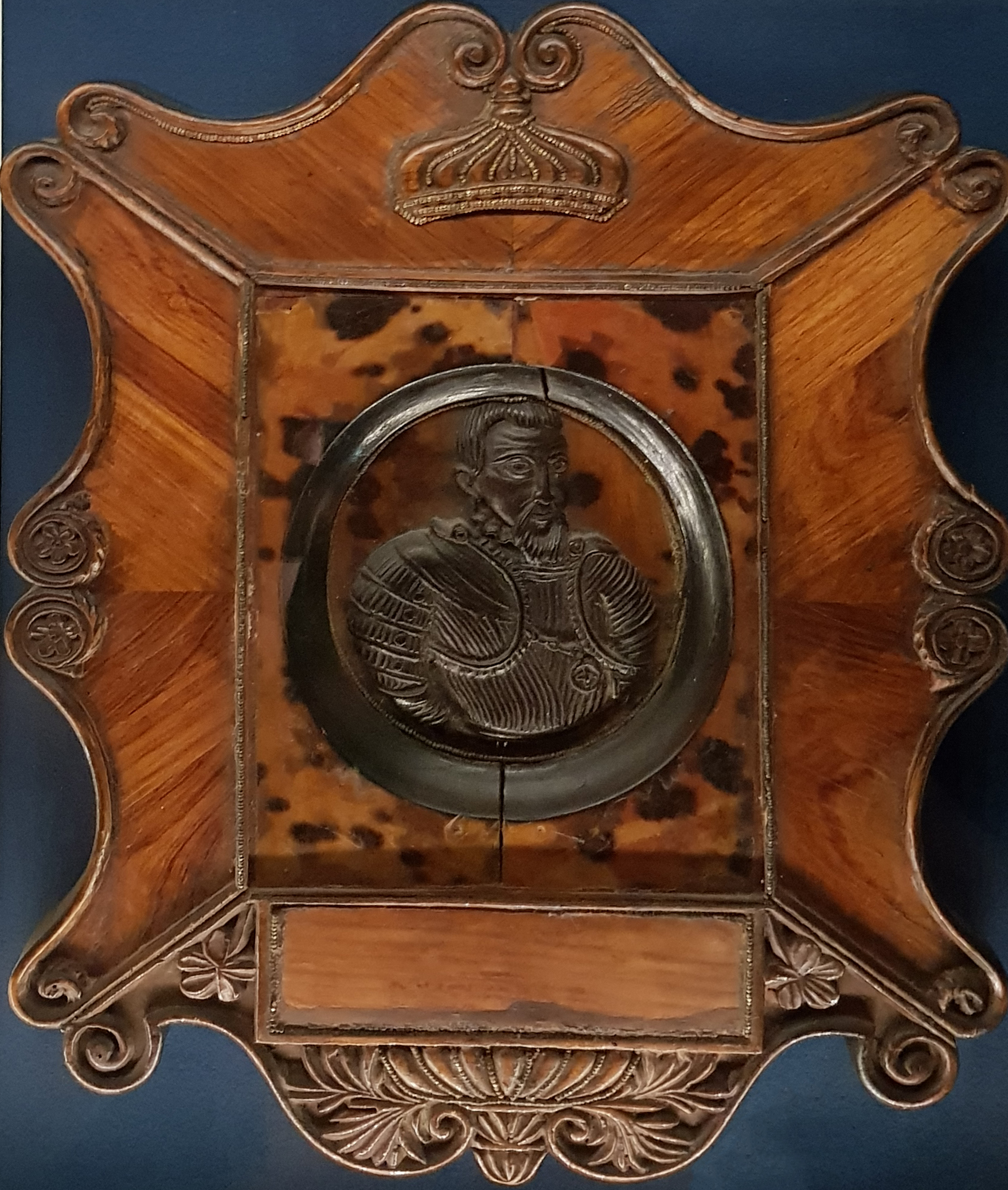 Беларуская (тарашкевіца): Разьбяны партрэт Юрыя Радзівіла «Геркулеса» (Jury Radzivił «Hierkules») XVI ст. (?), рама XIX ст. Мацей Радзівіл, прыватная калекцыя